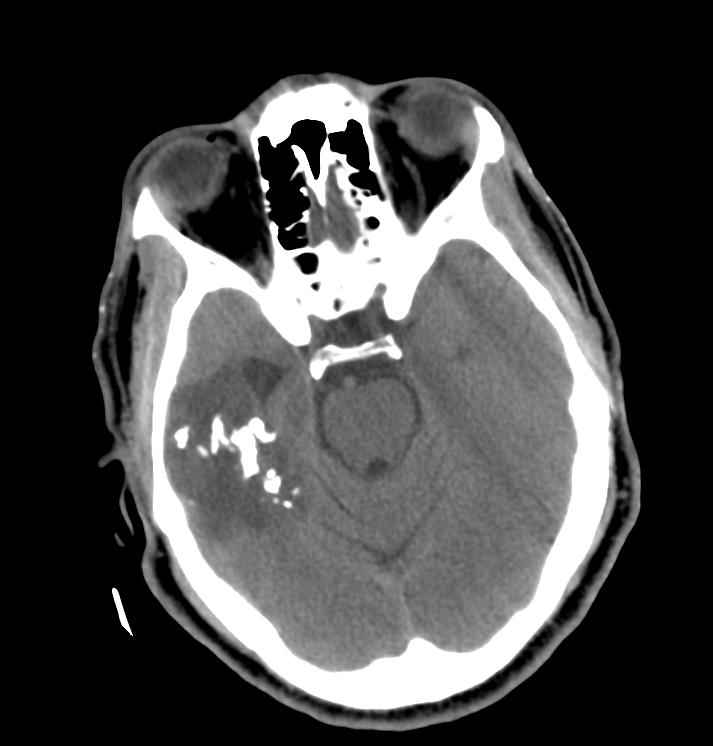 Oligodendroglioma, CT